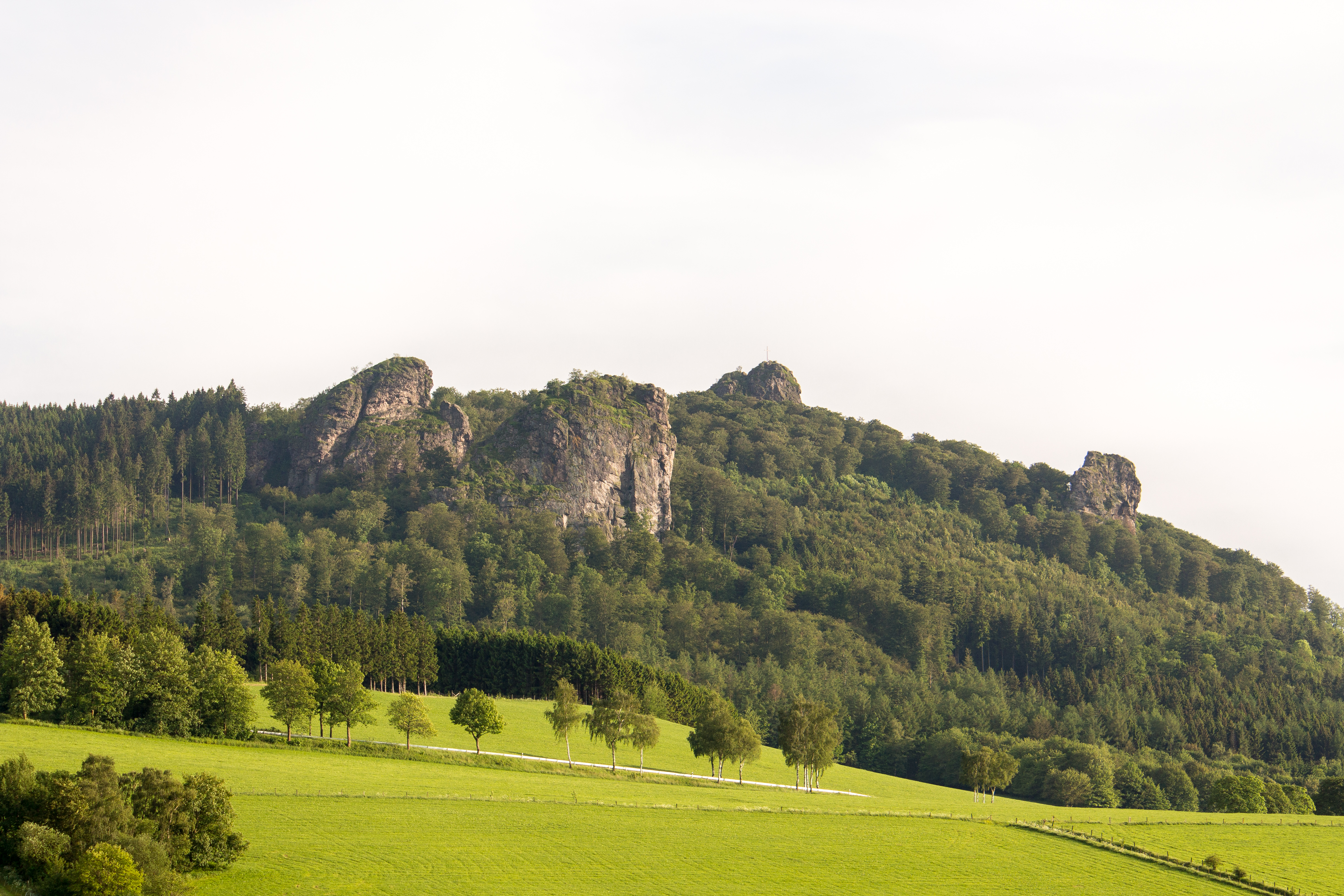 Blick zu den Bruchhauser Steinen, Olsberg, Hochsauerlandkreis, Nordrhein-Westfalen